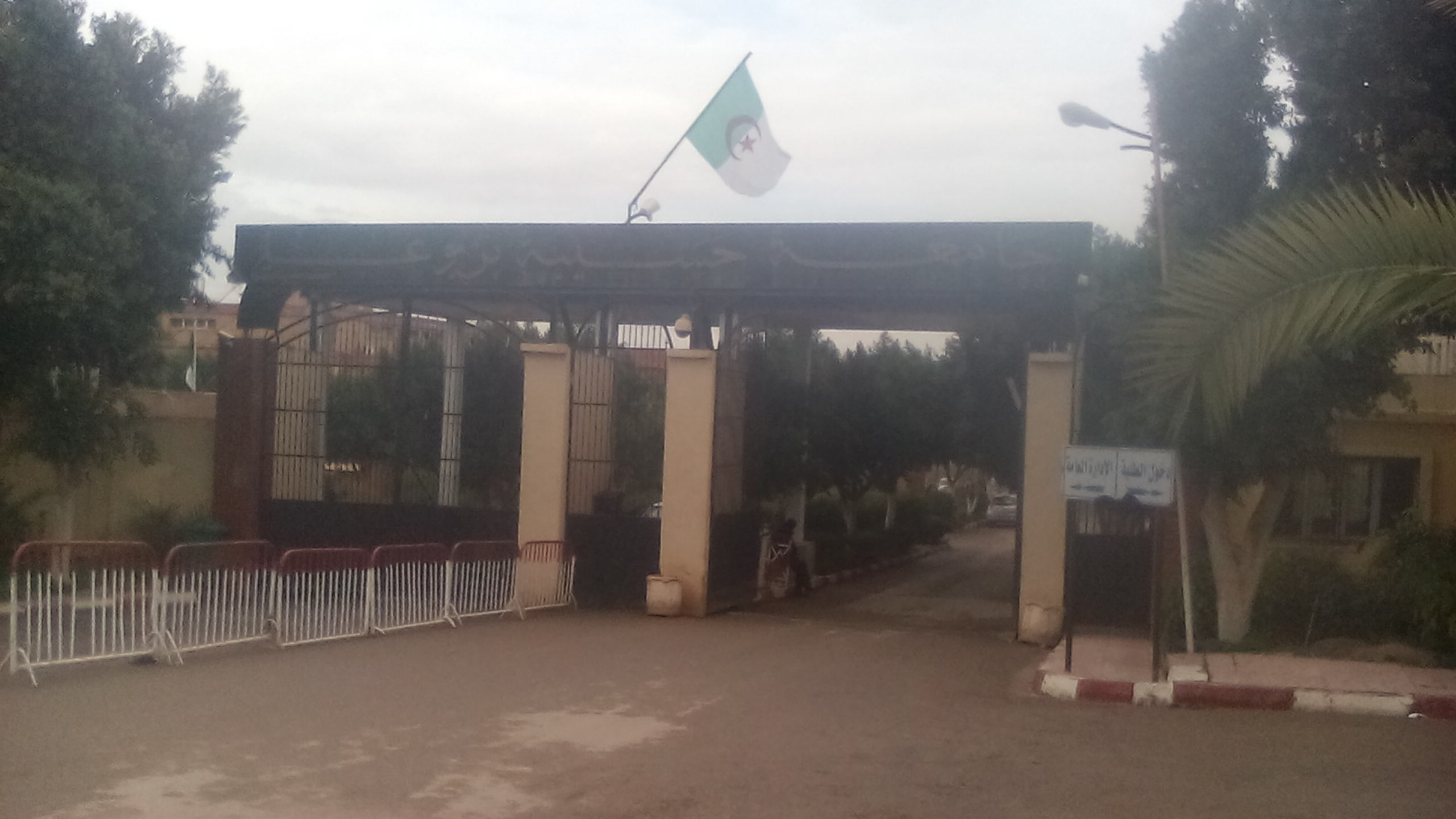 Uhbc de Salem